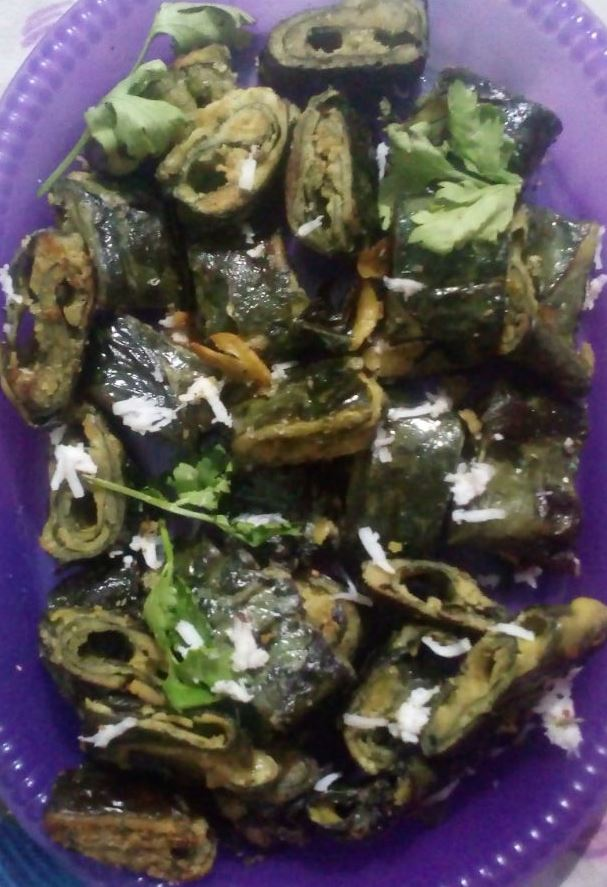 अळूवडी